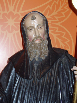 San Millán de la Cogolla